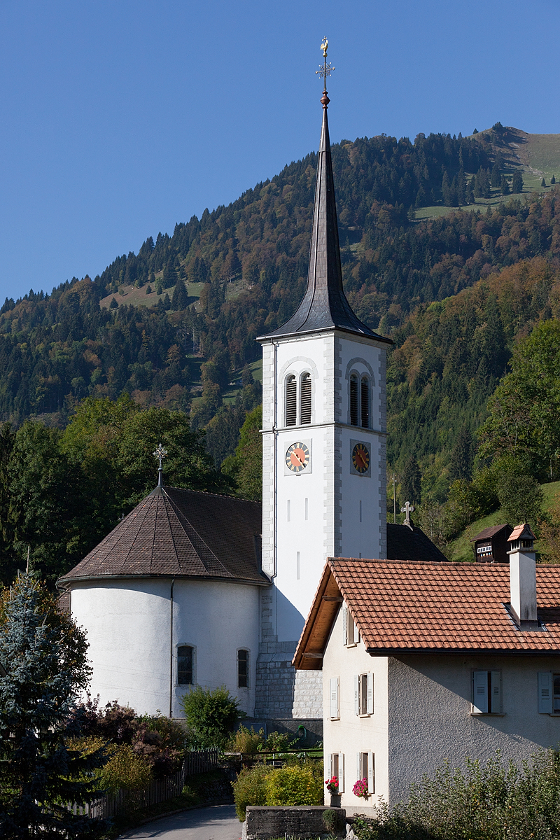 Eglise Saint-François-d'Assise à Neirivue (Haut-Intyamon) (FR)